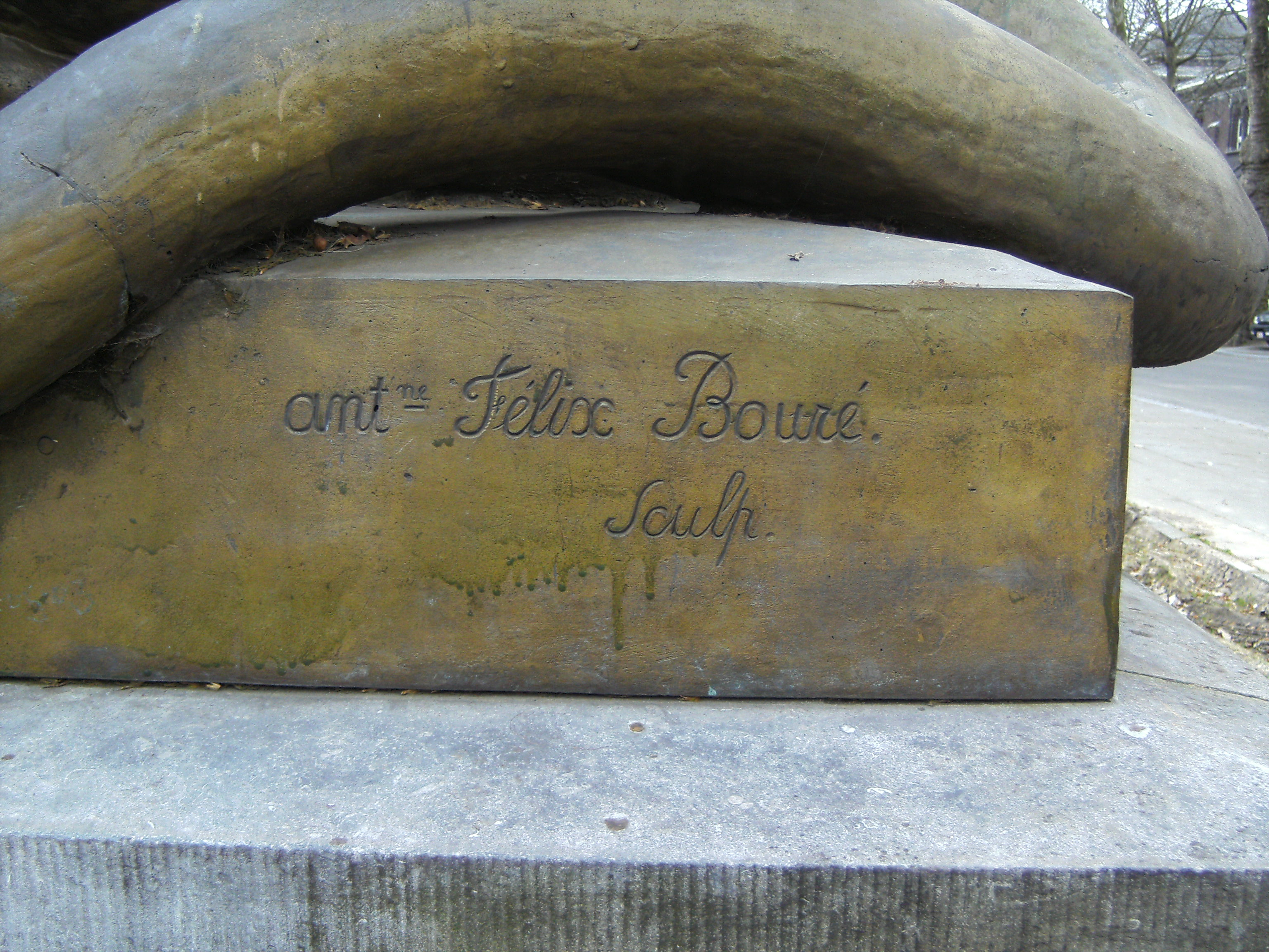 Tutur et Totor, surnoms donnés aux deux lions de bronze, oeuvre de Félix Antoine Bouré (19ème siècle). Anciennement placés sur les marches du Palais de Justice aujourd'hui démoli du boulevard Audent à Charleroi. Actuellement boulevard Defontaine, à proximité du nouveau Palais de Justice. Signature du sculpteur.